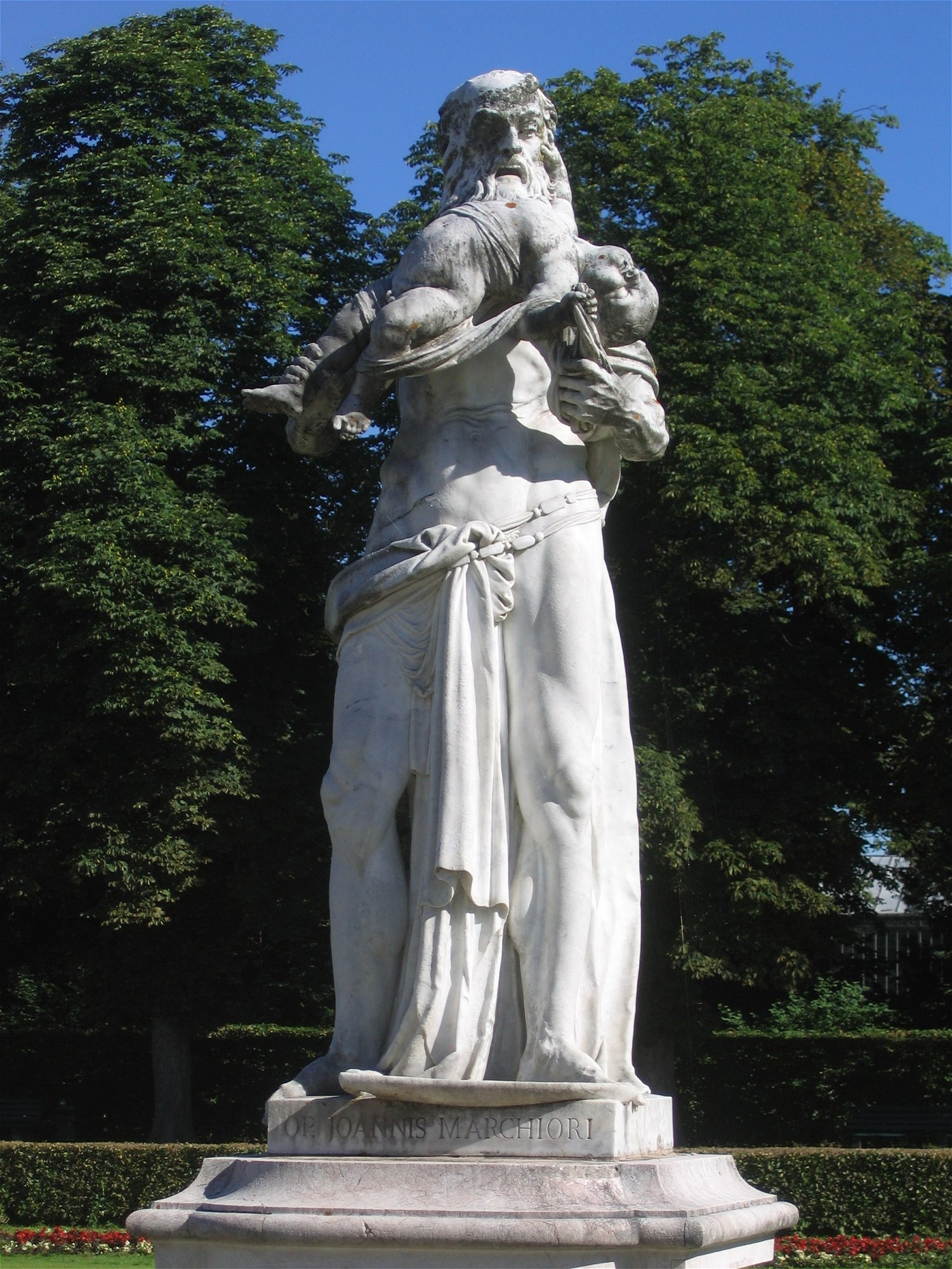 Schlosspark Nymphenburg, Statue im Gartenparterre, Saturn von Giovanni Marchiori